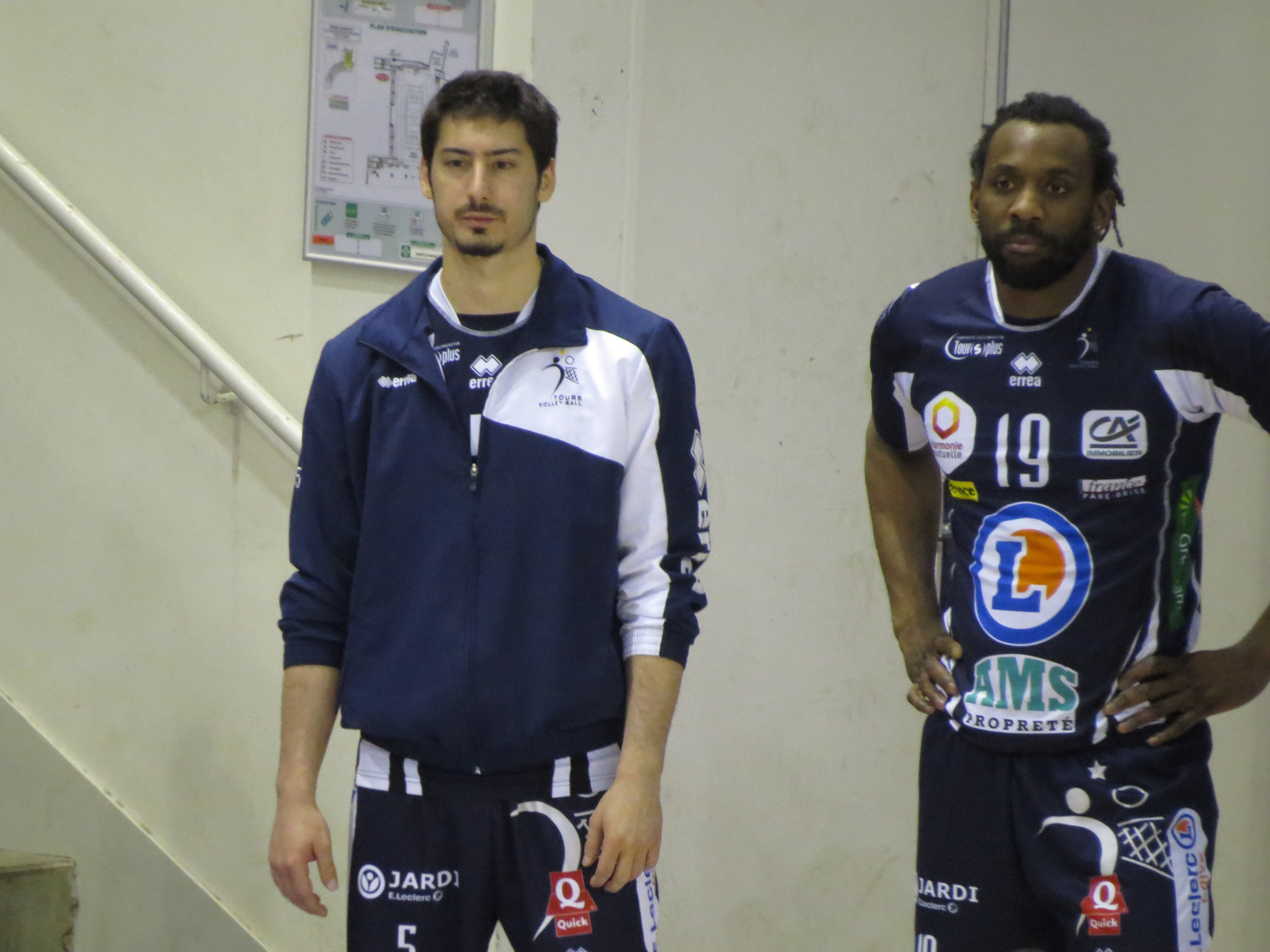 Match 2 de la demi-finale du Championnat entre le Paris Volley et le Tours Volley Ball Victoire de Paris 3-2 5 : Rajko Strugar 19 : Ludovic Castard